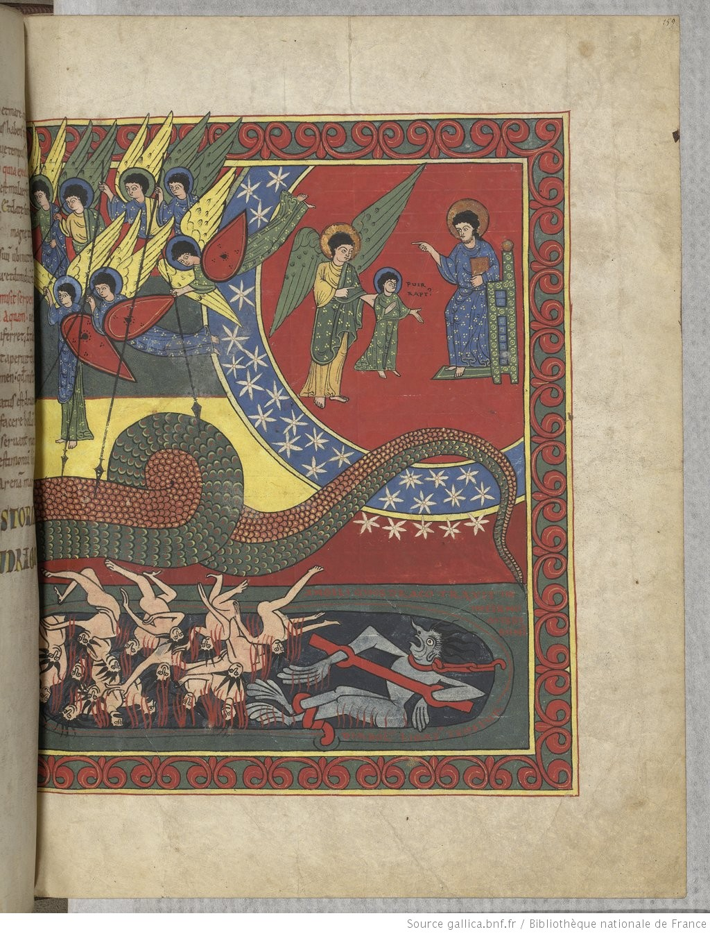 Folio 159r de l'Apocalypse de St Sever (XIe siècle, Bibliothèque Nationale, Paris). L'Enfant élu de Dieu pour sauver le monde de l'Enfer.